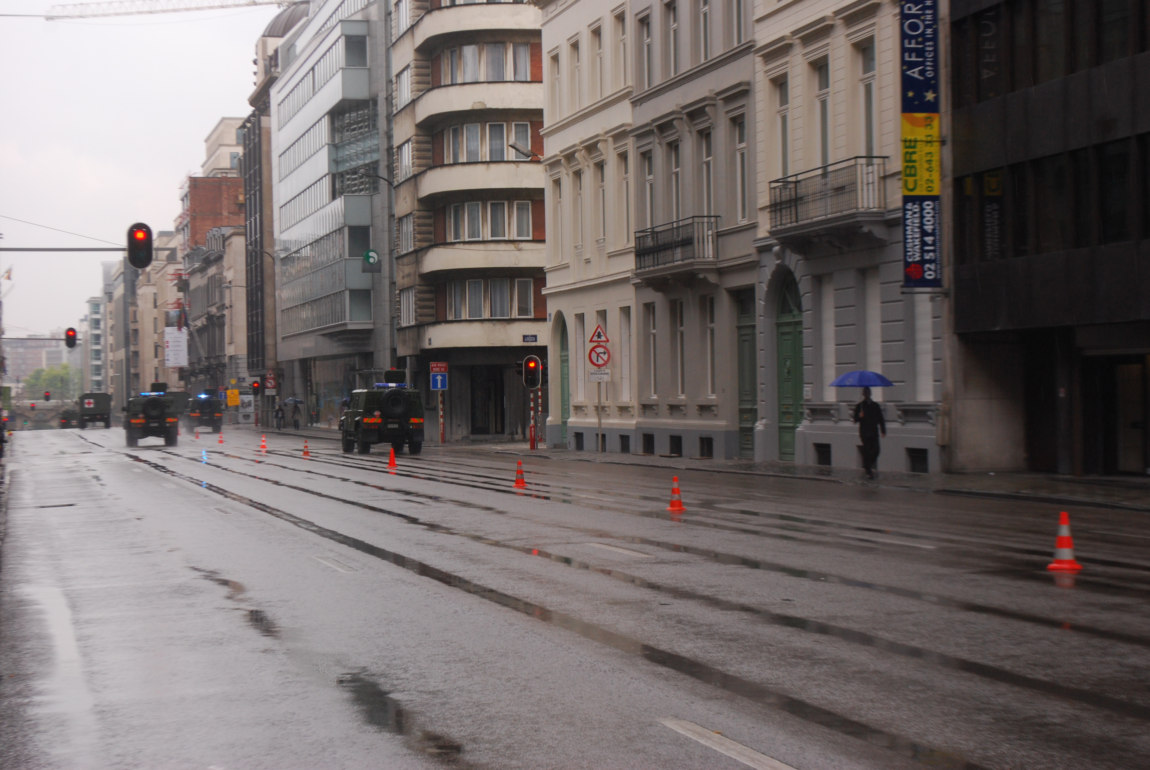 Dispersion des véhicules du défilé de la Fête nationale belge à Bruxelles, le 21 juillet 2011.